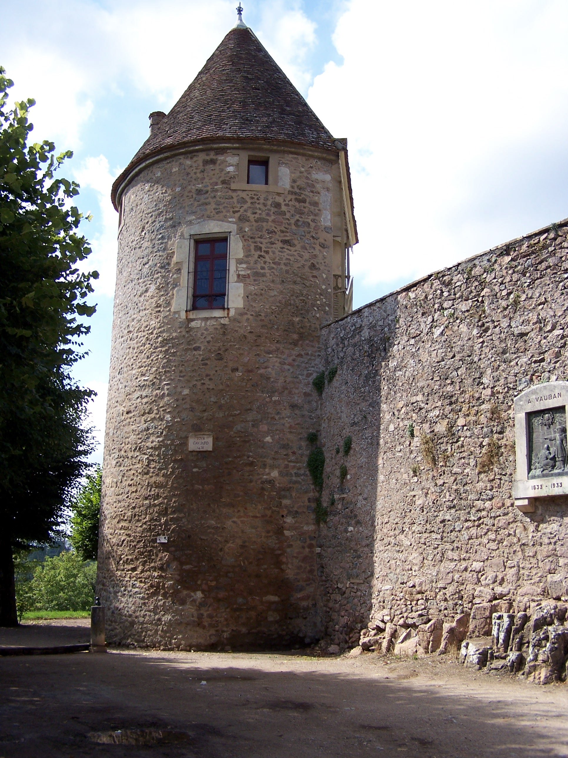 Tour Gaujard construite en 1438 à Avallon (Yonne, Bourgogne-Franche-Comté, France.